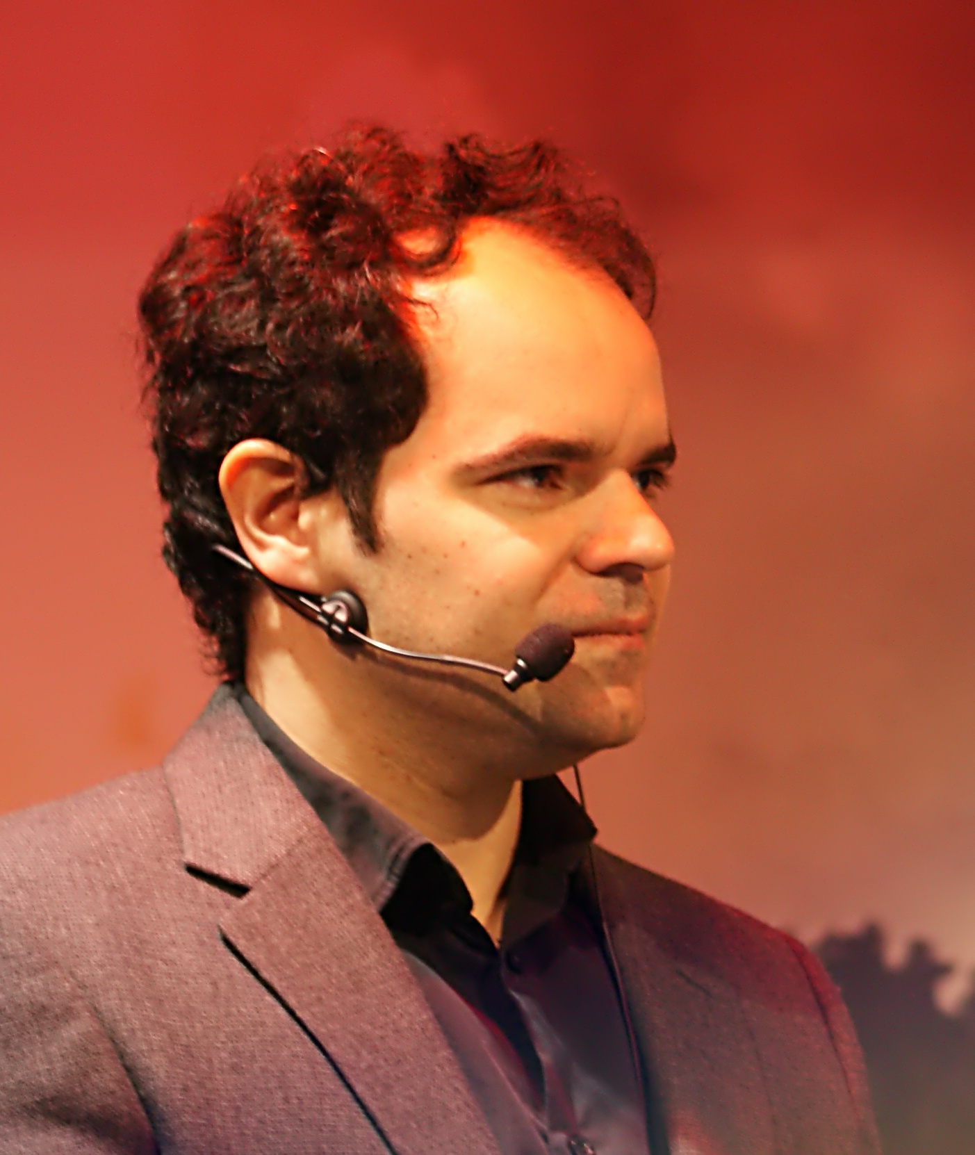 Paulo Silva, februari 2011.